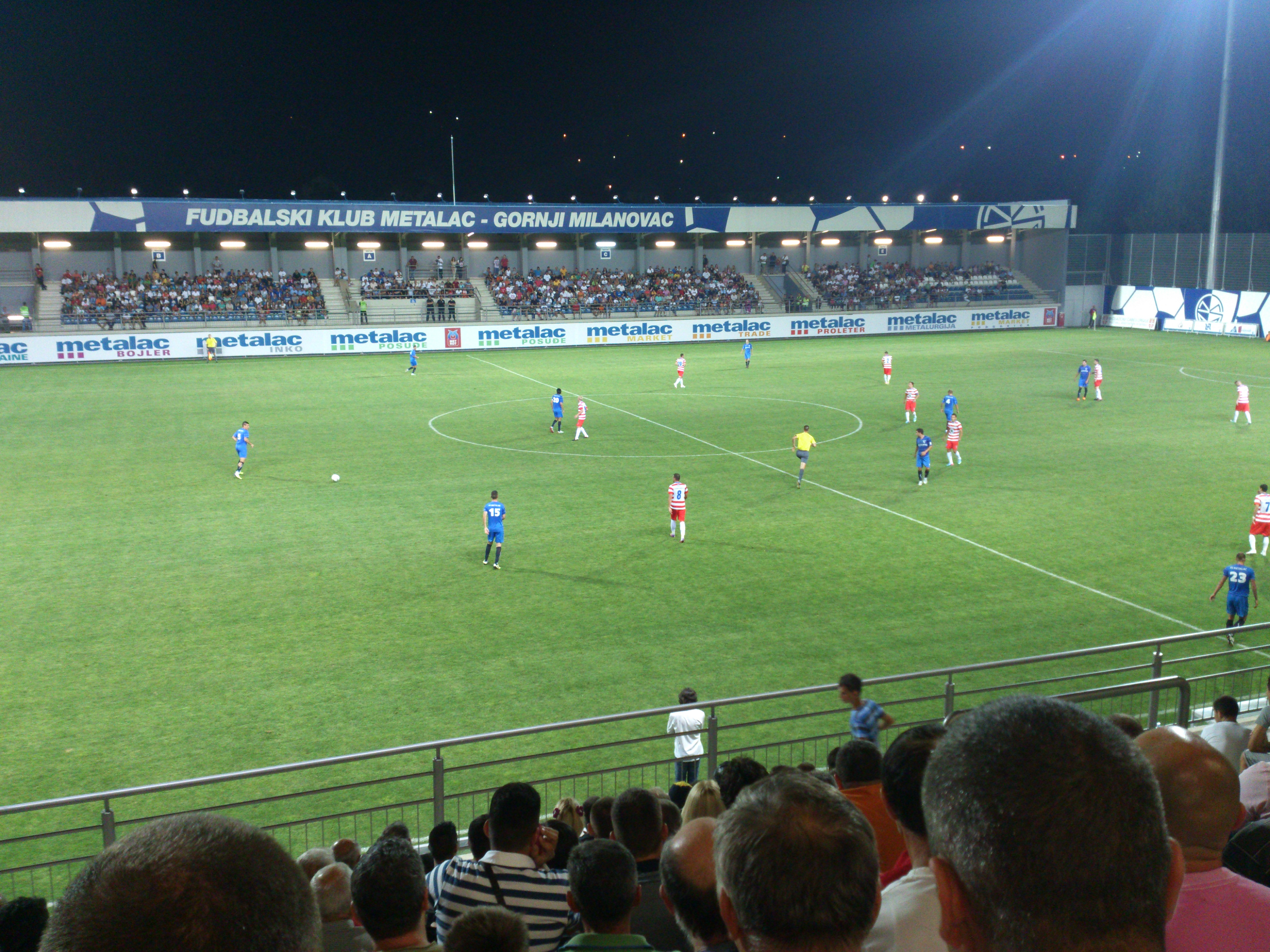 Derbi na startu sezone 2013/2014. Metalac-Borac.